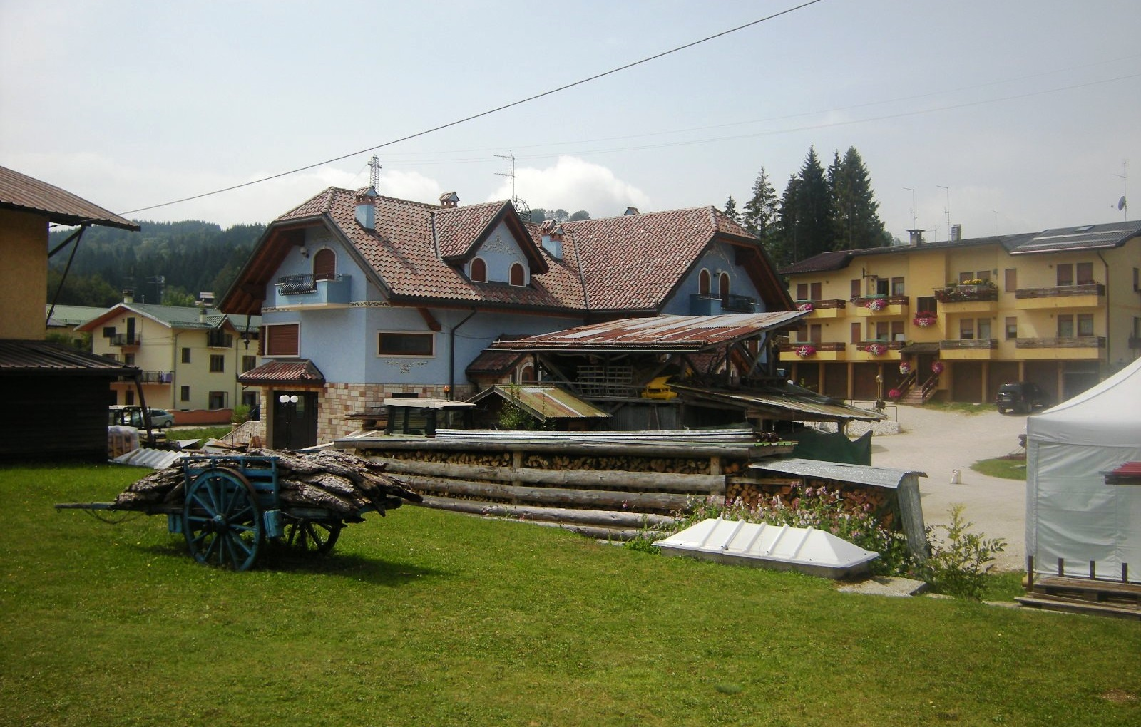 Panorama di Treschè Conca (frazione di Roana)